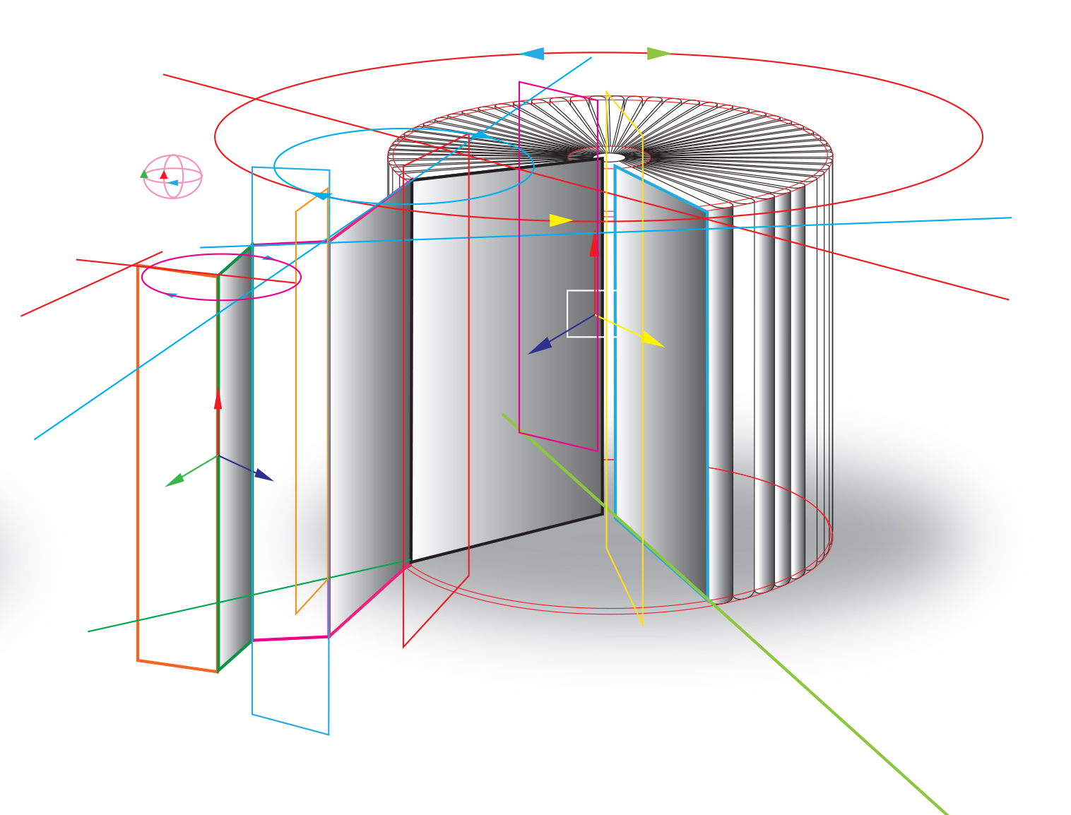 Schéma du Todiébook : une fois plié et sous sa forme circulaire le Todiébook se déploie dans l’espace